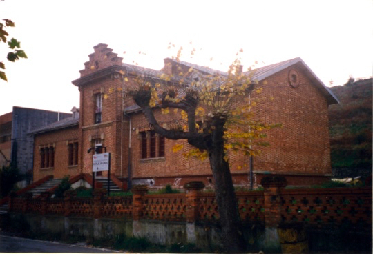 Escuelas del Ave María en Arnao-Castrillón, Asturias (España)